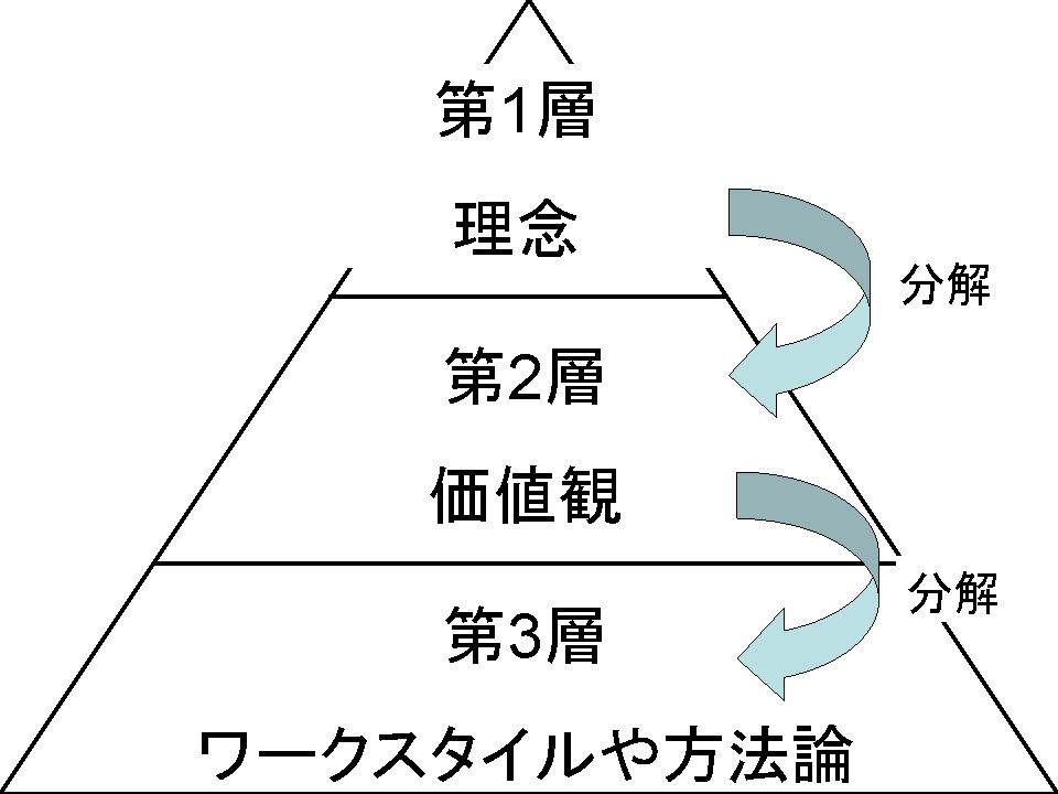 ケンブリッジ・テクノロジー・パートナーズ株式会社における、カルチャーの分解